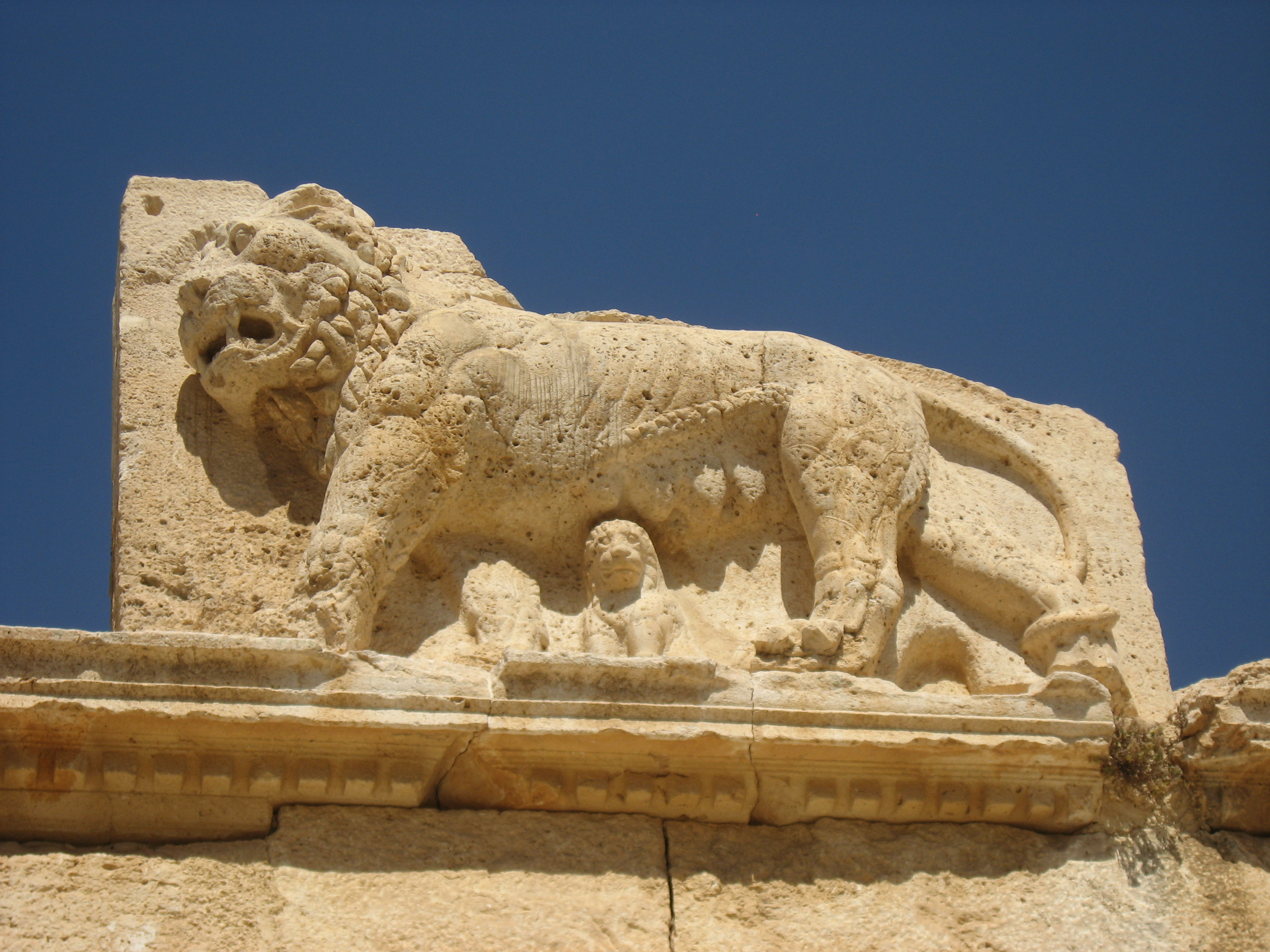 Château d'Iraq al-AMir Qasr al-Abd